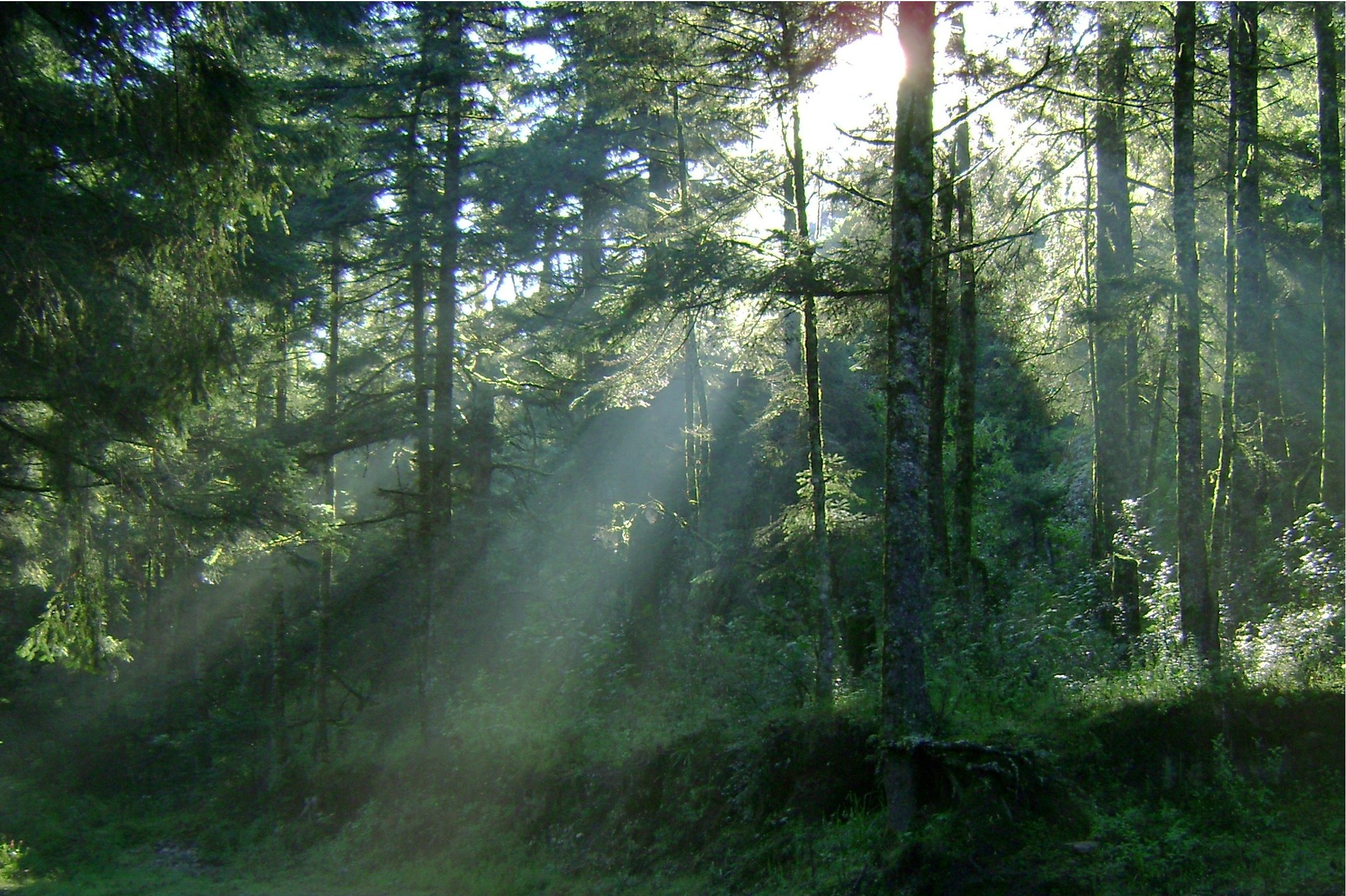 Este es mi mundo, natural. Durante mi caminata pasada por el Parque Nacional de El Chico hice esta toma. La verdad es que esta imagen la tomé casi a pie de carretera. Pude hacerla más adentro del bosque pero en ese momento el sol se elevaba y evaporaba el rocío de las hojas. En resumen las condiciones eran buenas para conseguir esta toma y creo que no salió tan mal.